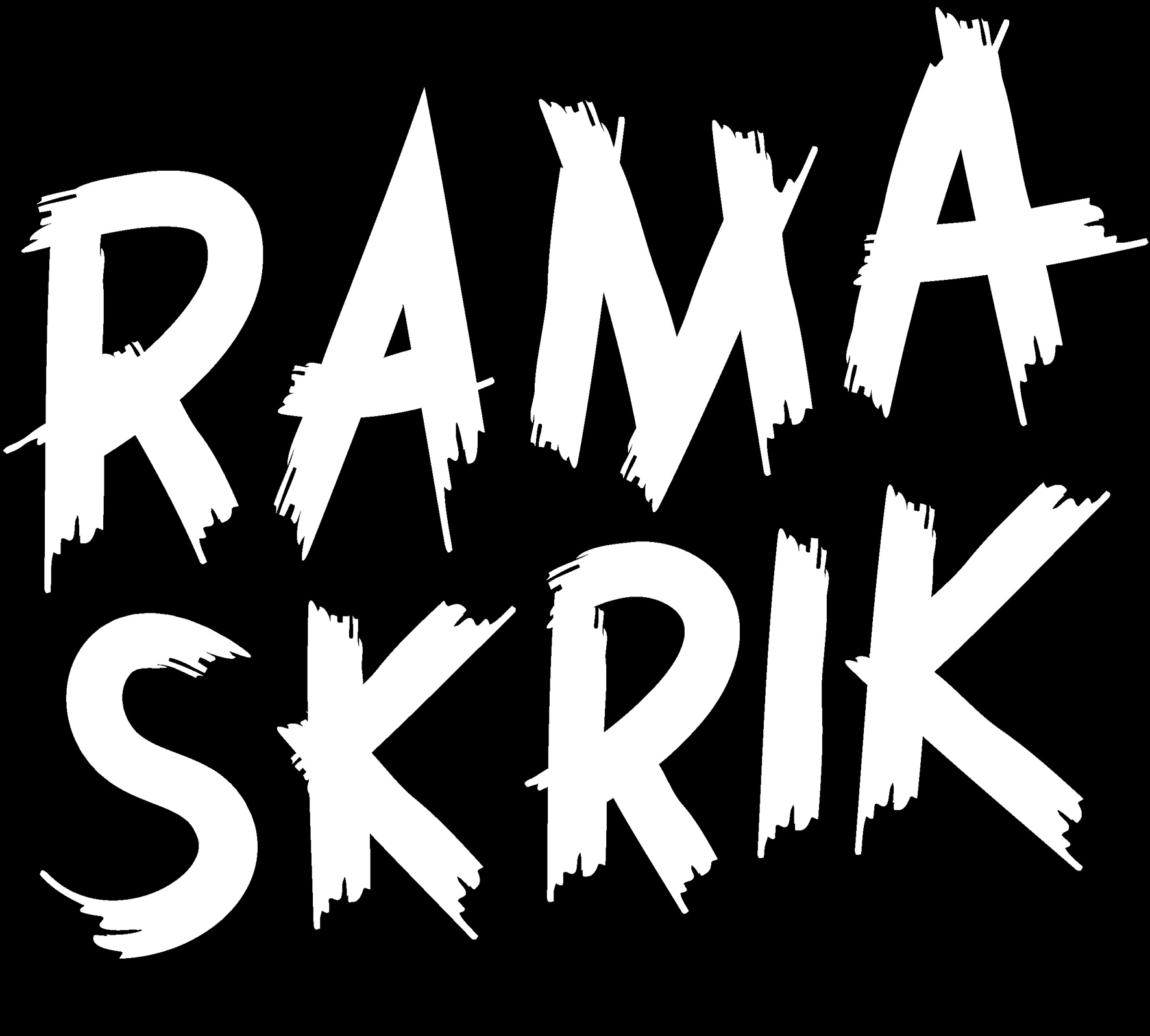 Ramaskrik logo sort